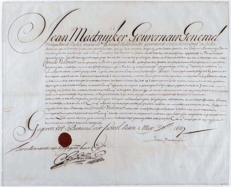 Document. De akte is ondertekend door de gouverneur-generaal Joan Maetsuijker en de secretaris van de Raad van Indië Jan van Riebeeck en gedagtekend: 'Gegeven tot Batavia in 't Casteel desen 4 mey Anno 1667. Het document is bekrachtigd met het grootzegel van G.G. en raden waarop een varend schip staat afgebeeld, met tussen de masten de letters 'D.O.C.' Originele aanstellingsakte van de onderkoopman Cornelis Valconier tot opperhoofd in Tonkin ter vervanging van de koopman Constantijn Ranst, die tot opperhoofd in Japan werd benoemd.. Aanstellingsakte van de onderkoopman Cornelis Valconier tot opperhoofd in Tonkin